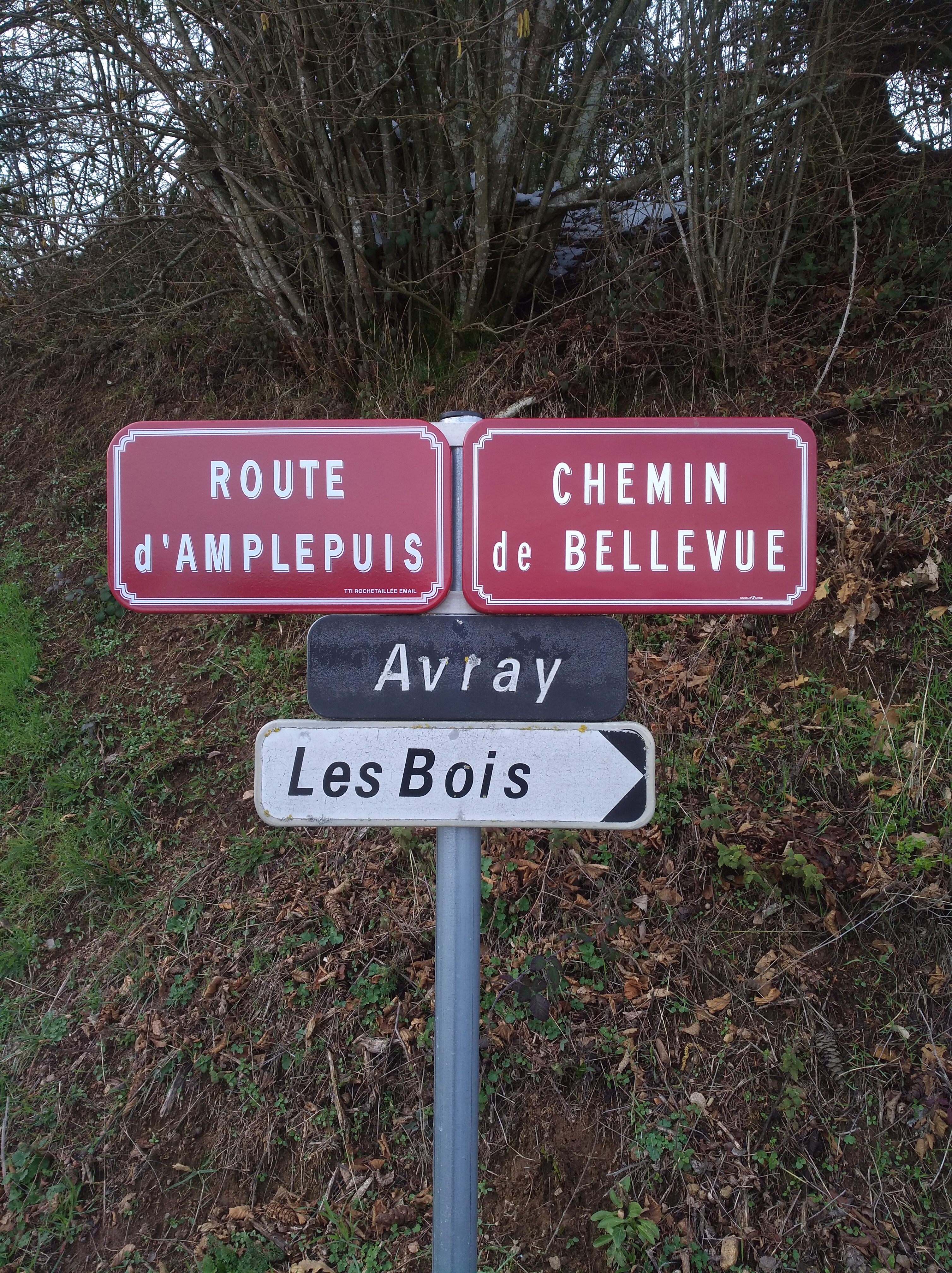 Panneaux de rue au lieu-dit "Avray" à Saint-Just-d'Avray (Rhône, France), en février 2018.